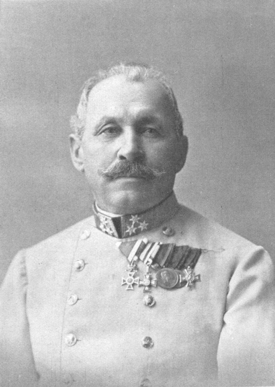 Marian Freiherr Varešanin von Vareš (1847-1917), Austrian-Hungarian general